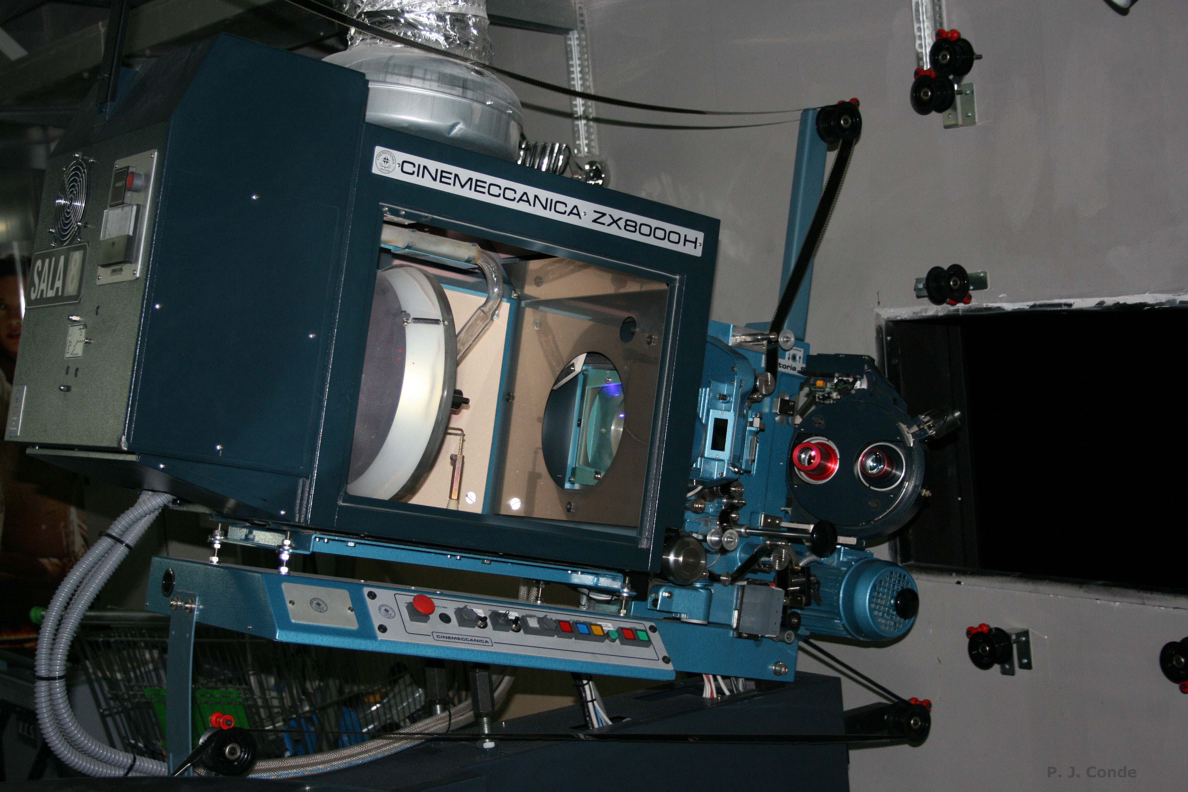 Cinemeccanica - modèle Victoria 5